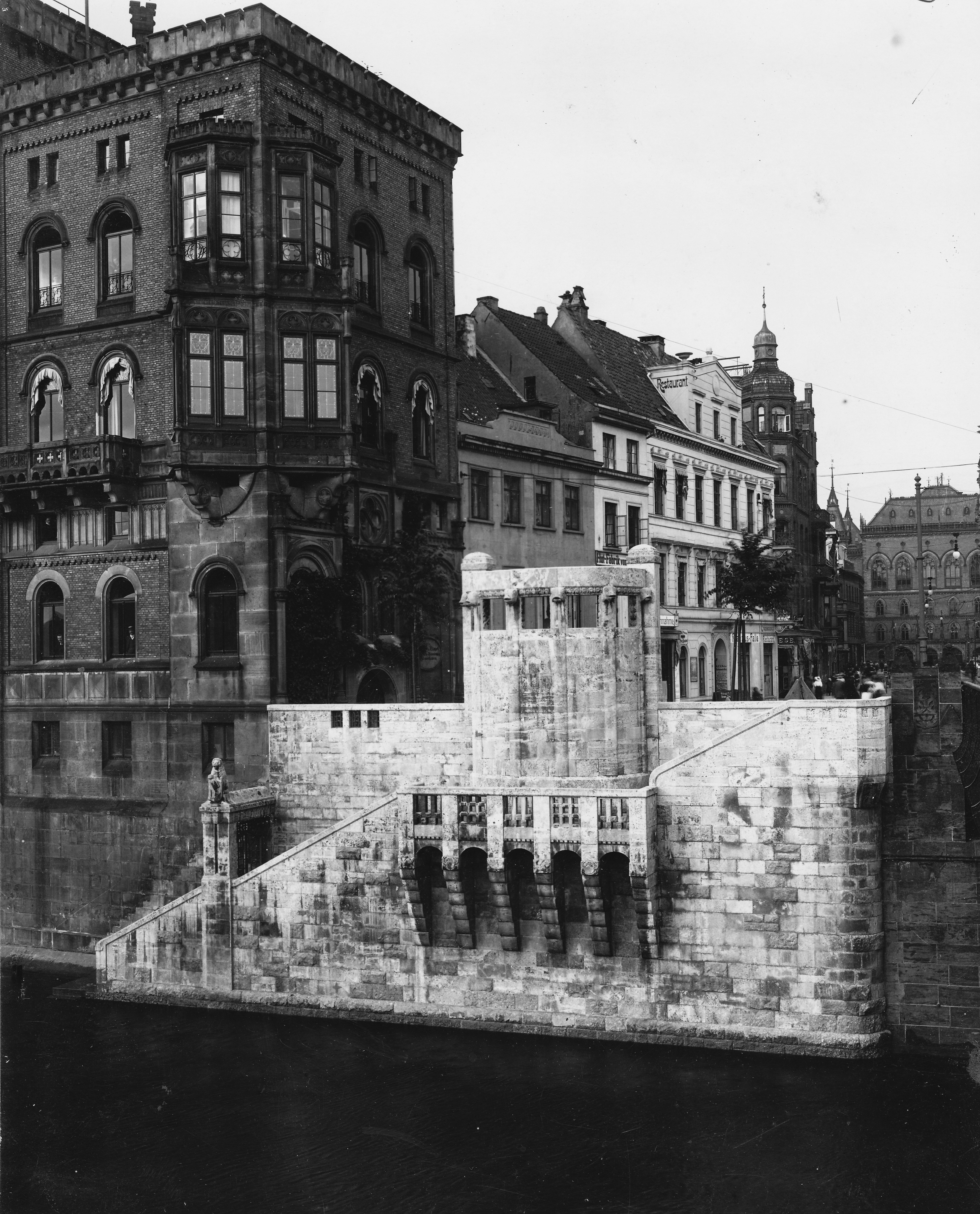 former Franzius-Denkmal, Bremen, 1908 (backside)